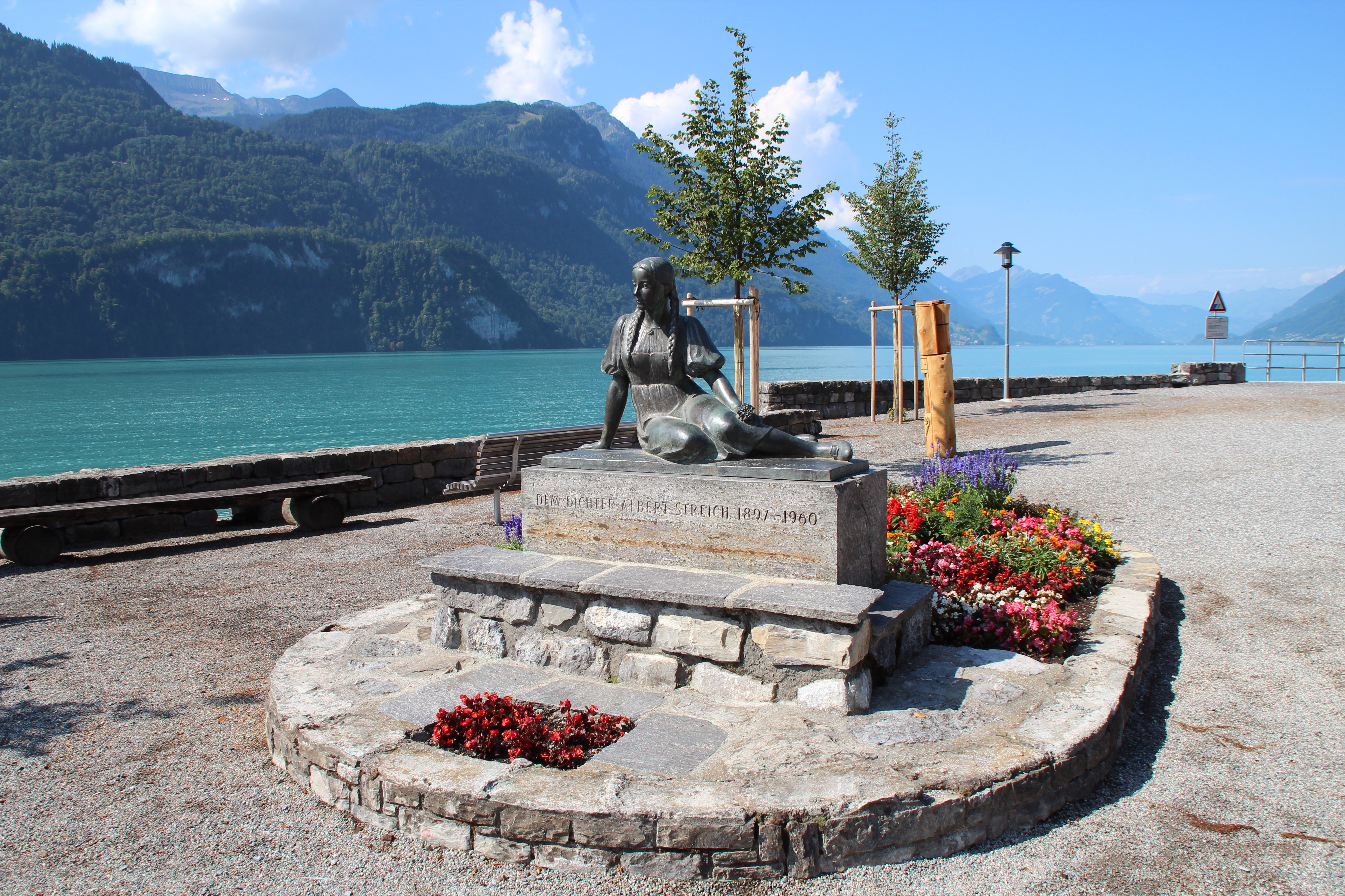 Denkmal zur Erinnerung an Albert Streich an der Seepromenade in Brienz, erstellt 1969